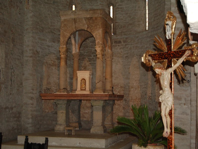 Interno della Pieve di San Giorgio in Valpolicella